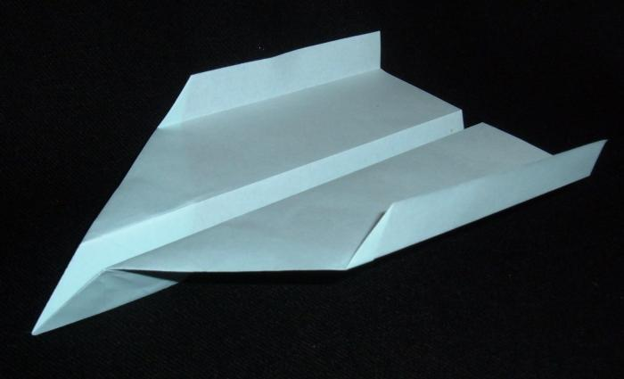 An 19.09.1997 flog de Entwurf von Robin Glynn 28,7 m - Origami-Weltrekord.